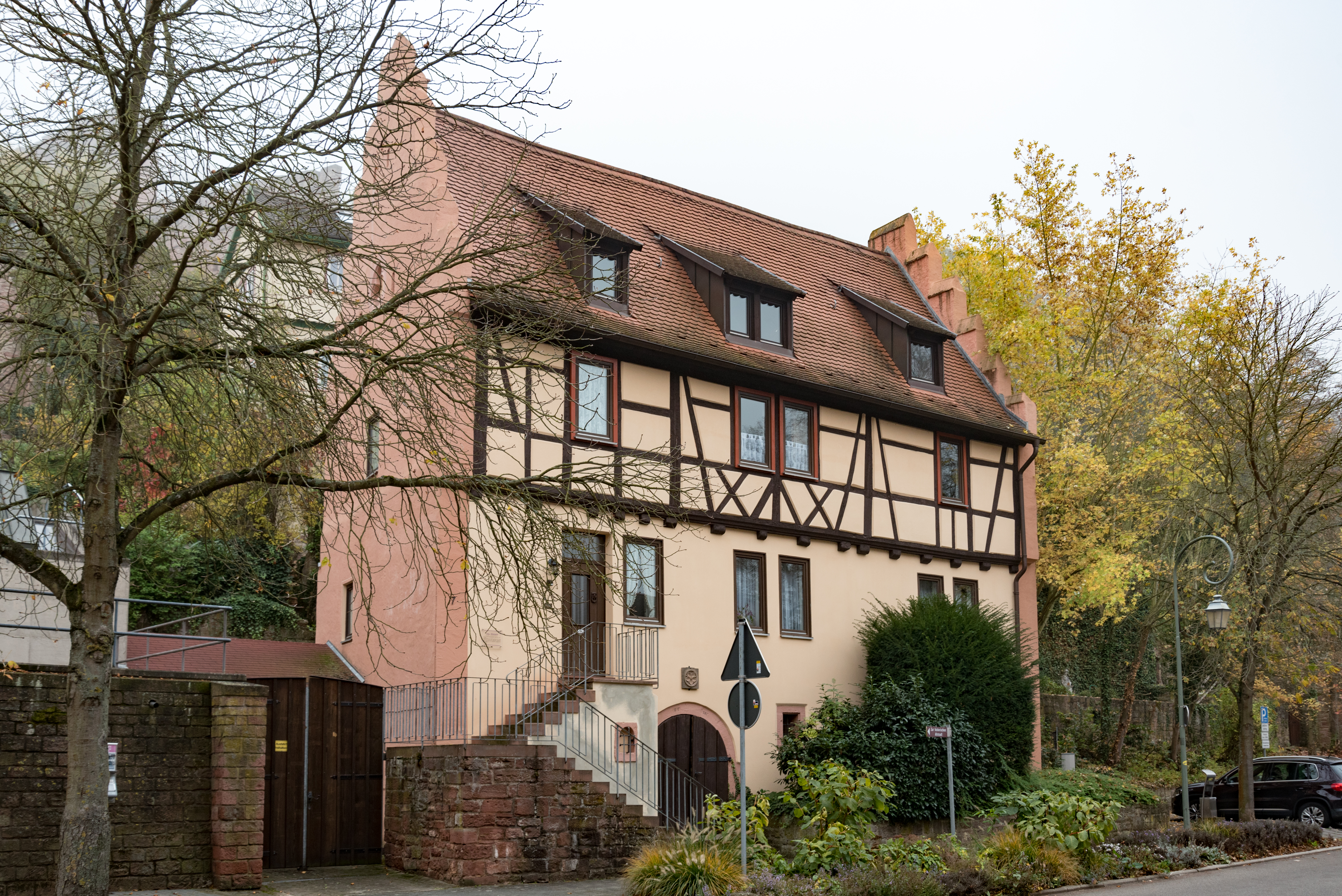 Wertheim, Mühlenstraße 7